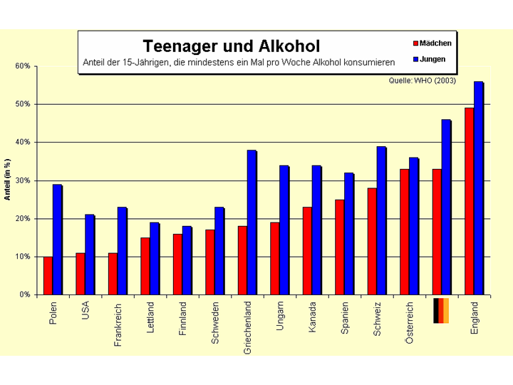 Teenager und Alkohol.png GNU-FDL Titel: "Teenager und Alkohol"